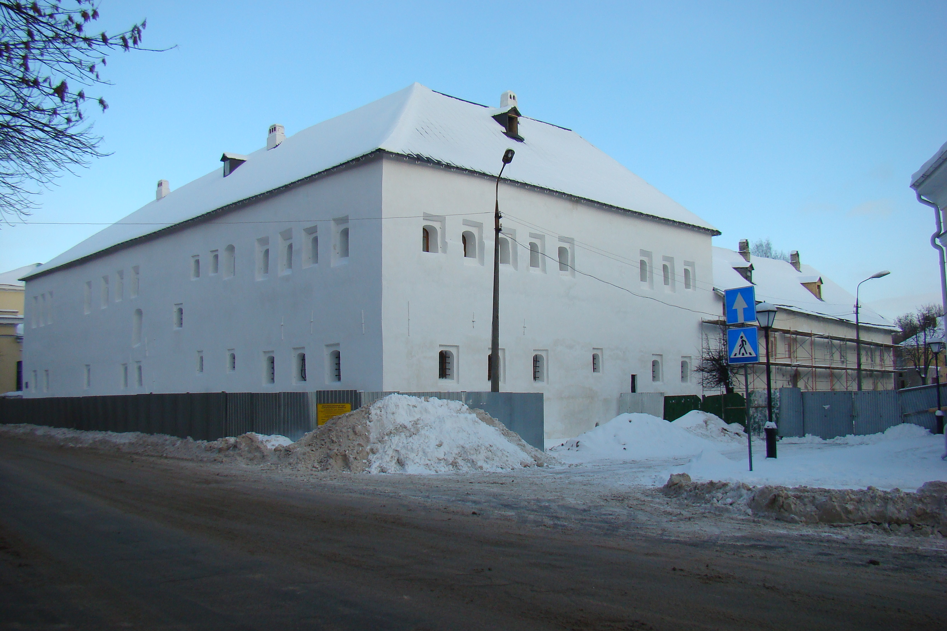 Паганкины палаты в Пскове